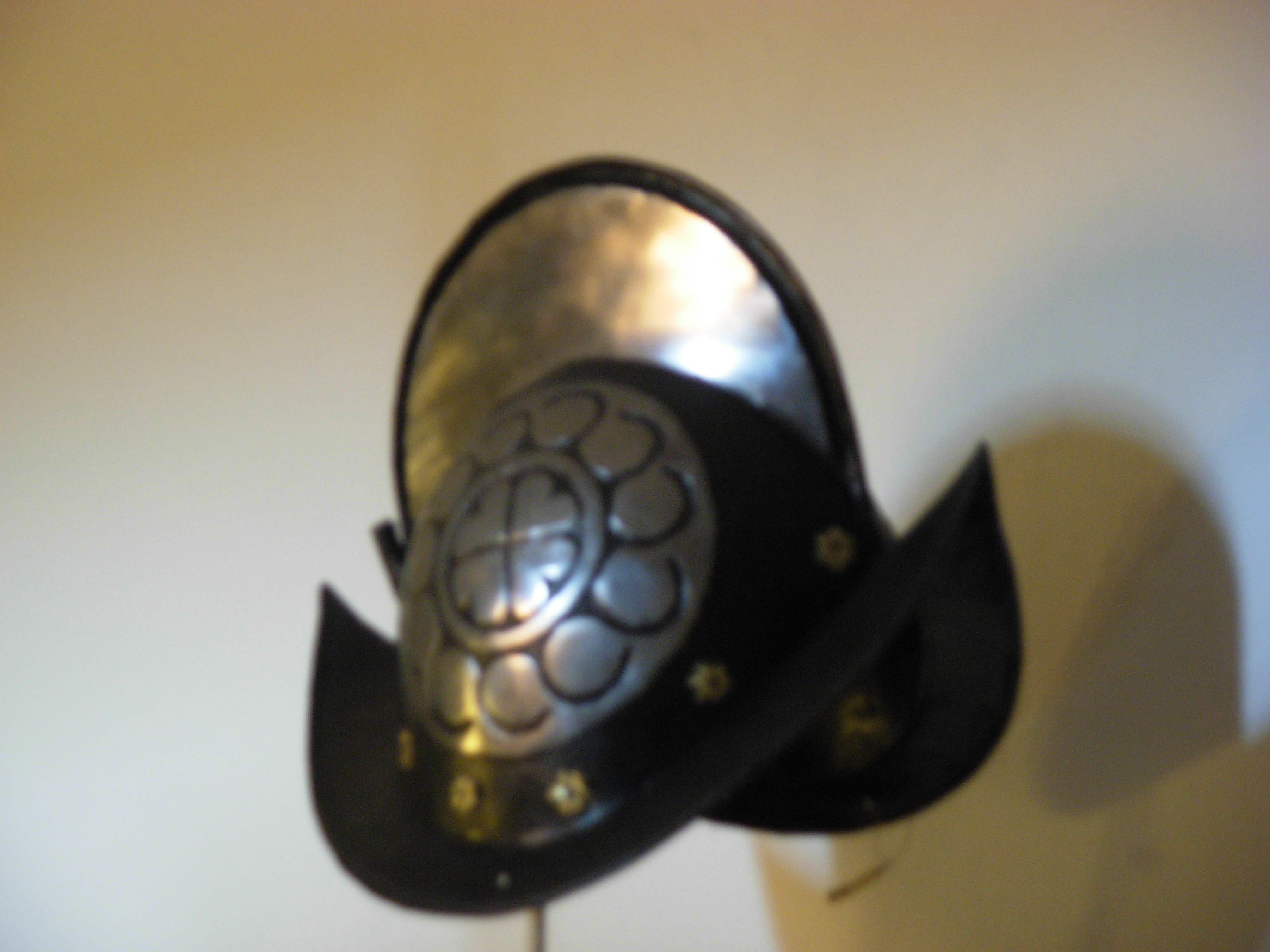 Items from Muzeum Zagłębia, in Castle in Będzin, Poland.